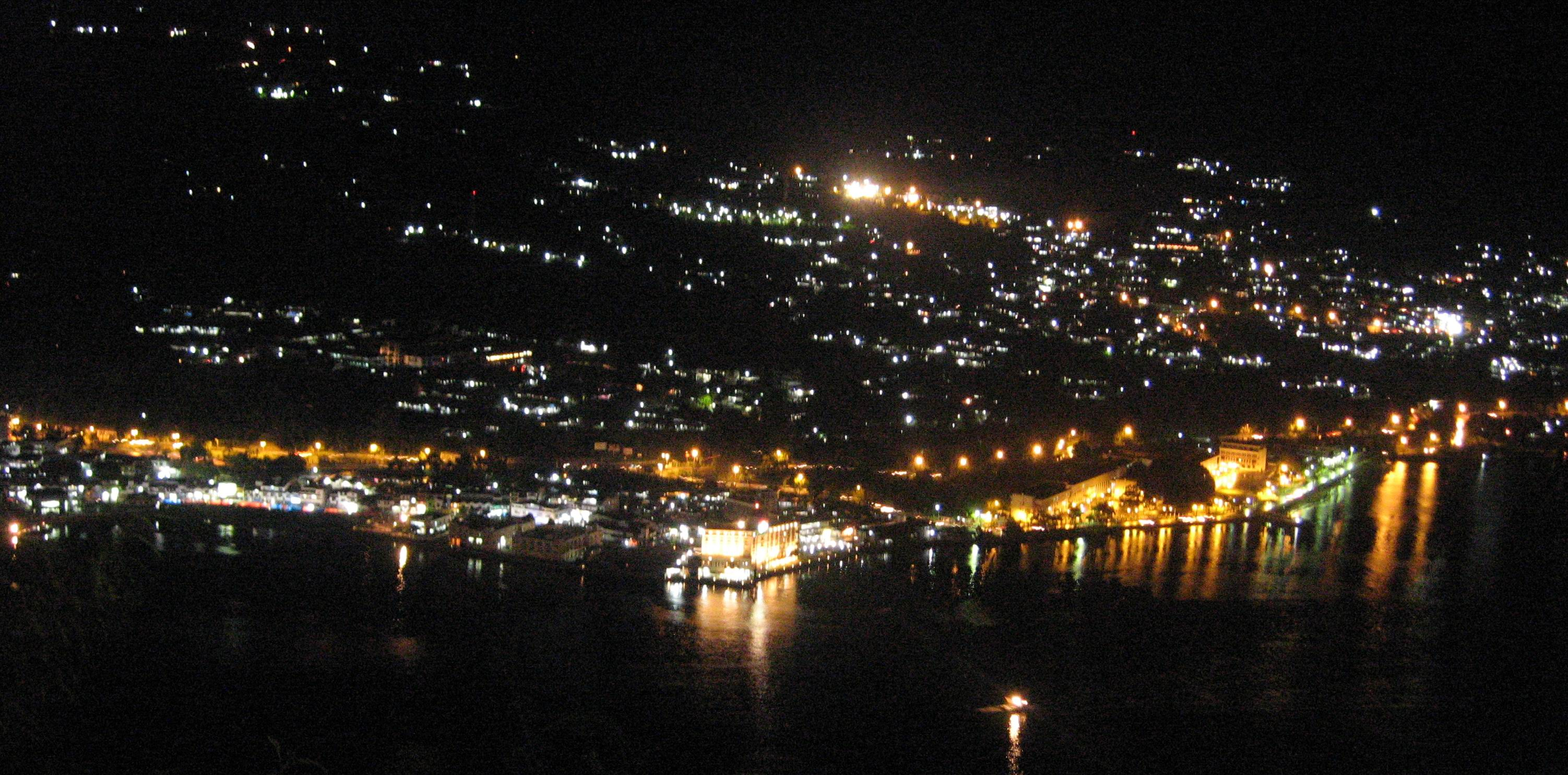 Jayapura at night